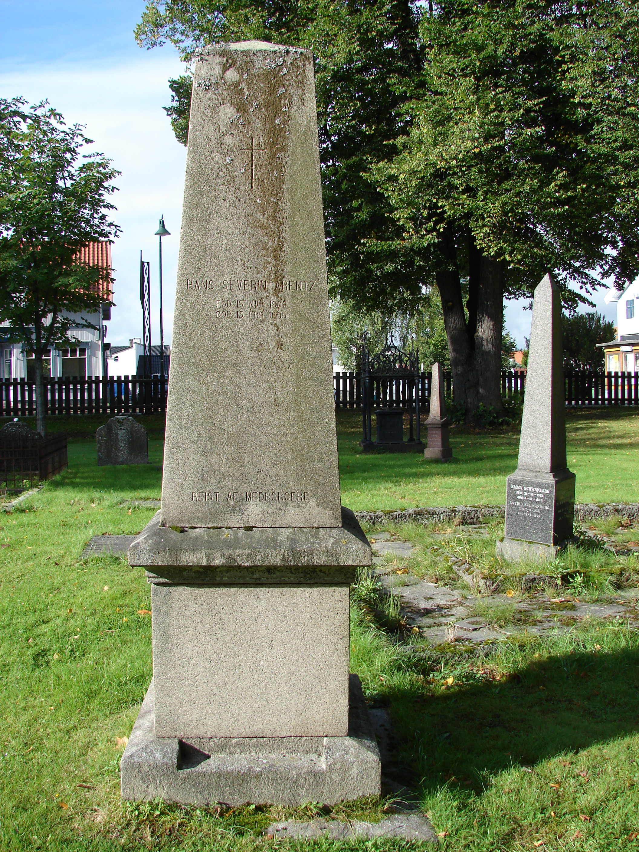 HANS SEVERIN ARENTZ , FÖD 15 NVE 1806, DÔD 13 FBR 1875, REIST AF MEDBORGERE, gravminde på Lie kirkegård, Skien